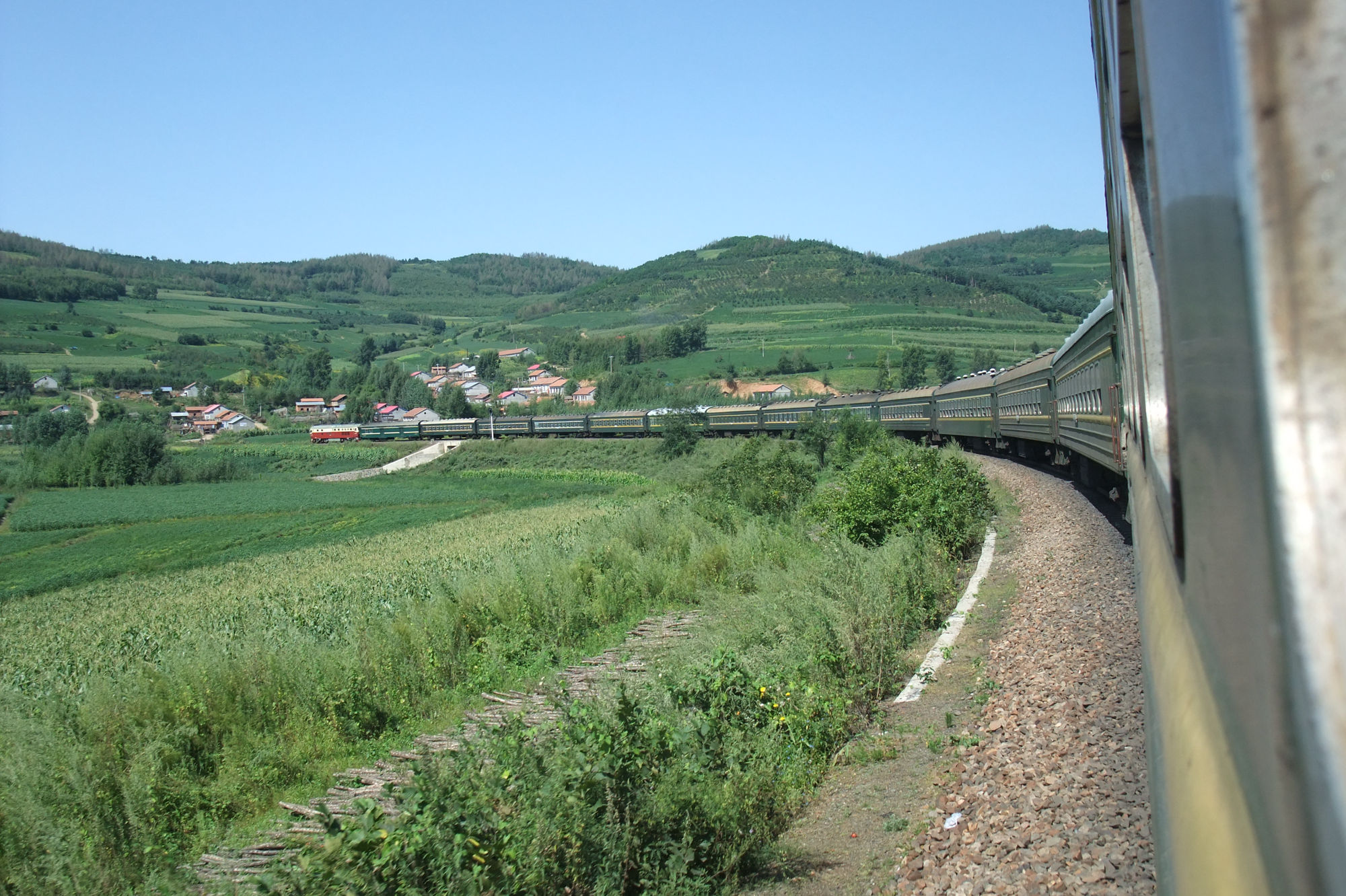 巡道工出品 Photo by Xundaogong